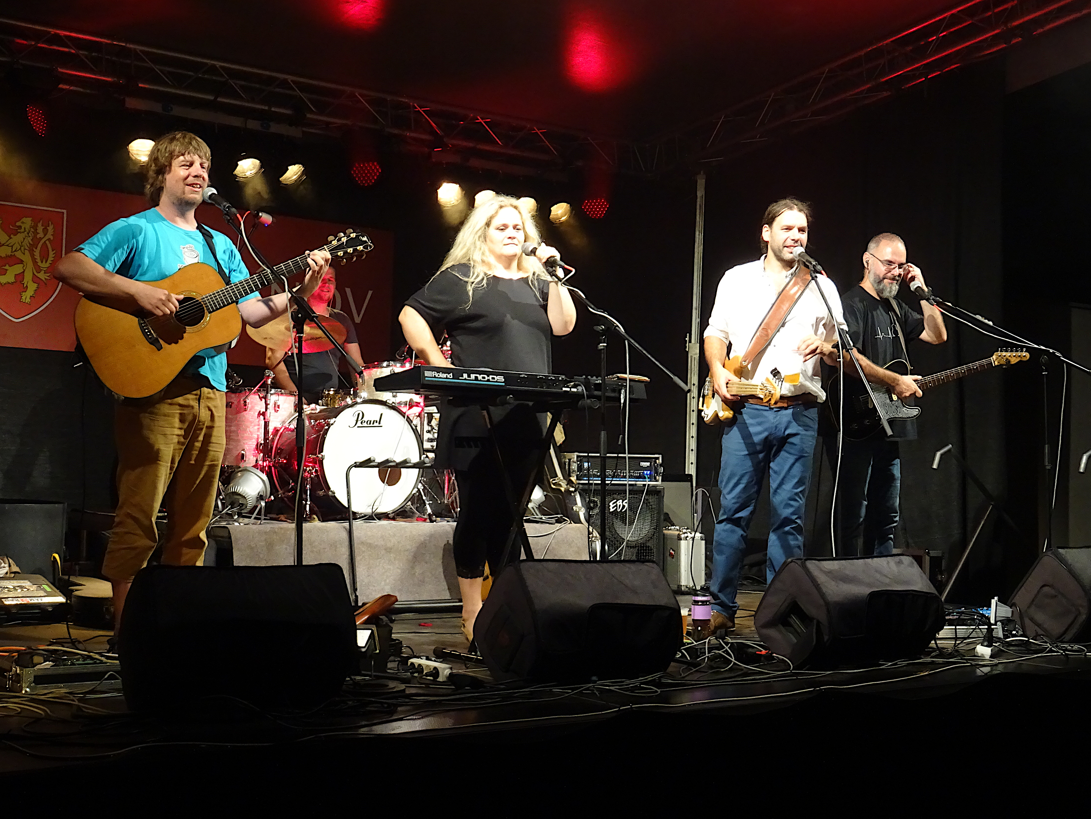 Skupina Jarret na koncertě v Rousínově v srpnu 2019